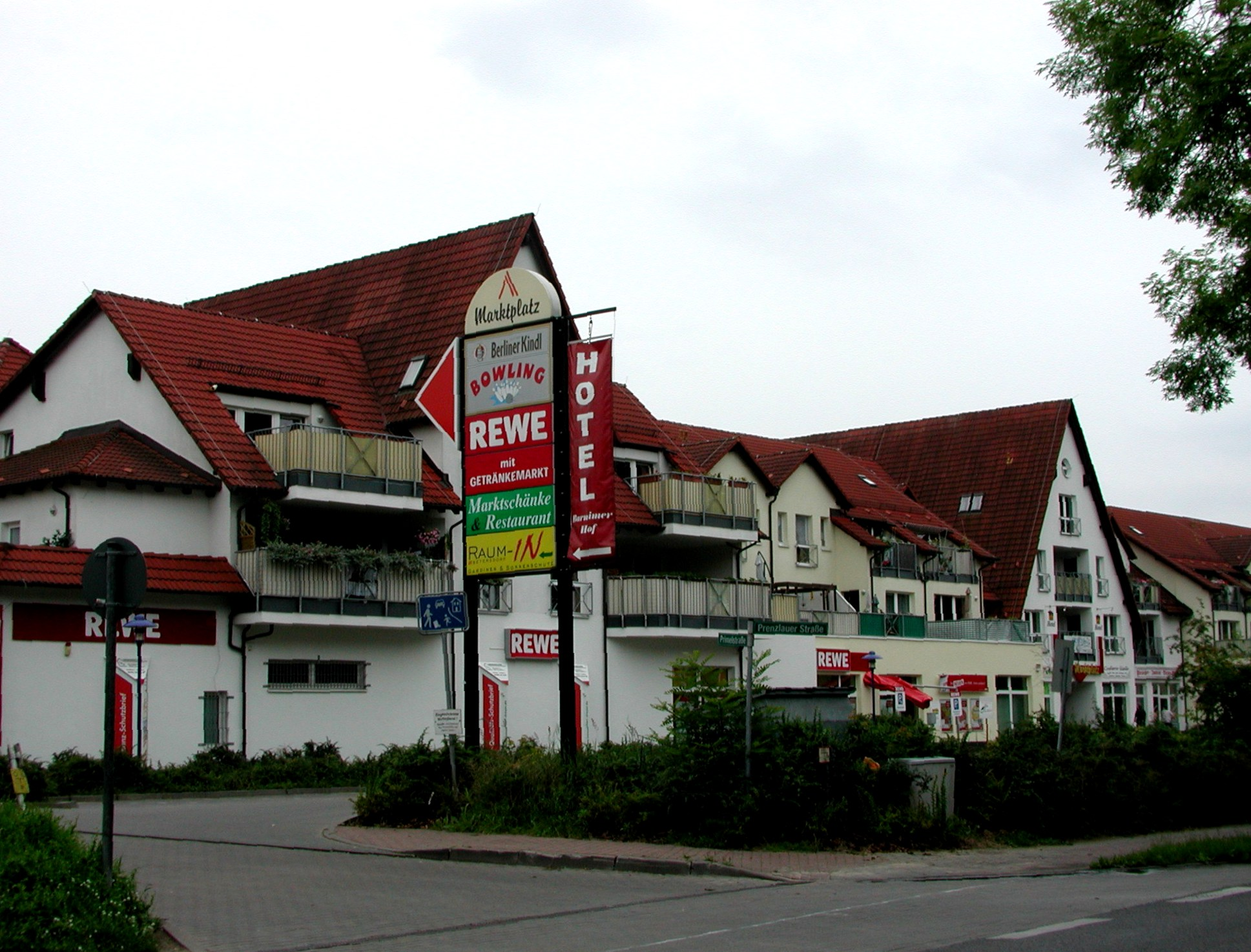 der neue Marktplatz Basdorf